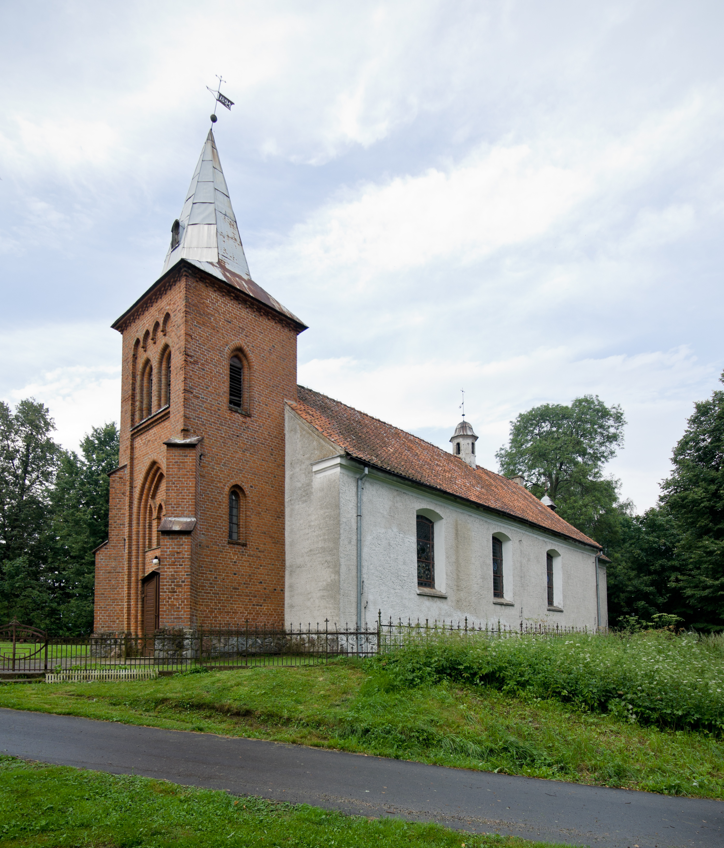 Kościół filialny pw. Narodzenia Najświętszej Maryji Panny w Jarandowie.